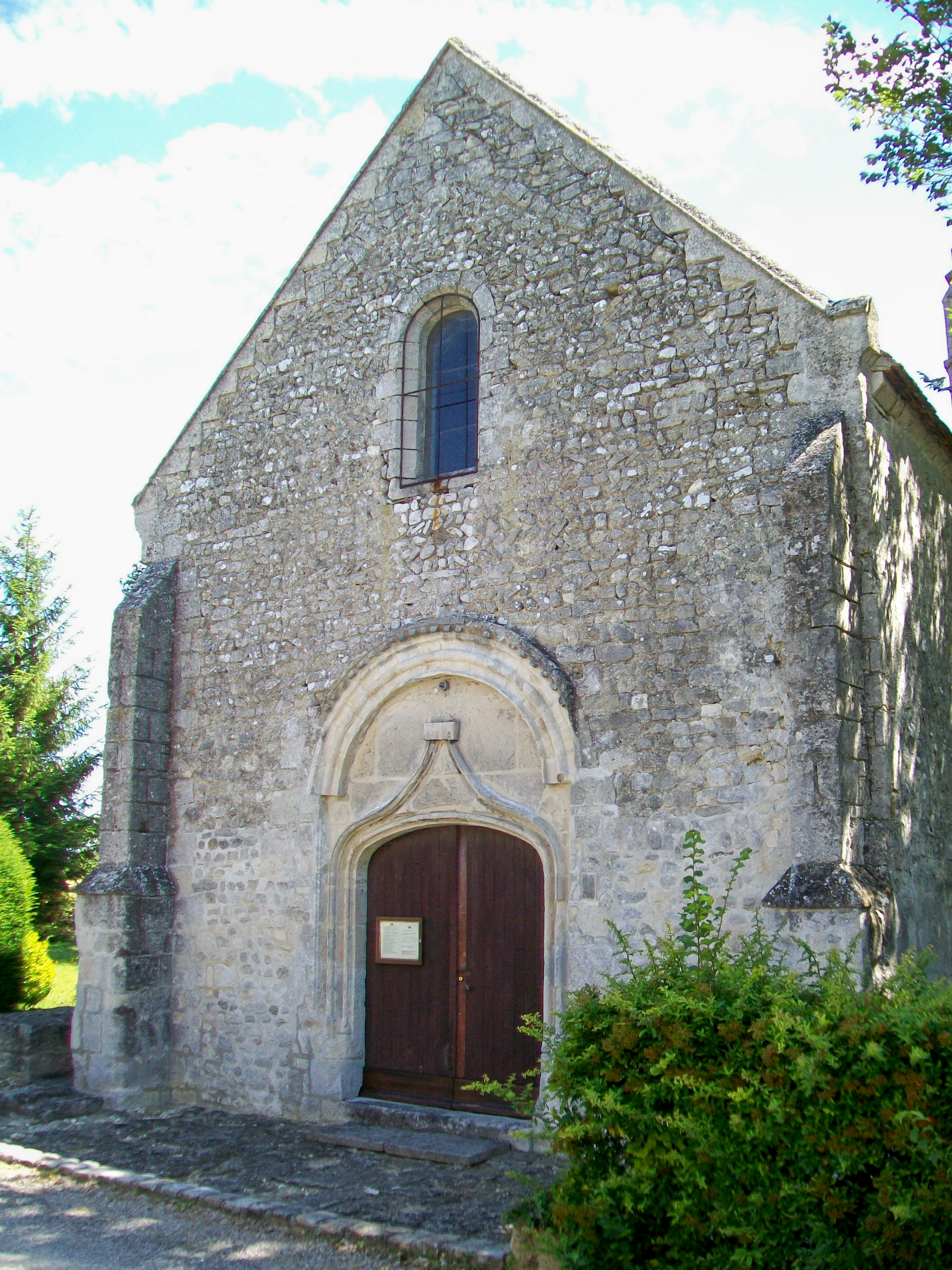 La façade ouest de l'église de Noël-Saint-Martin.